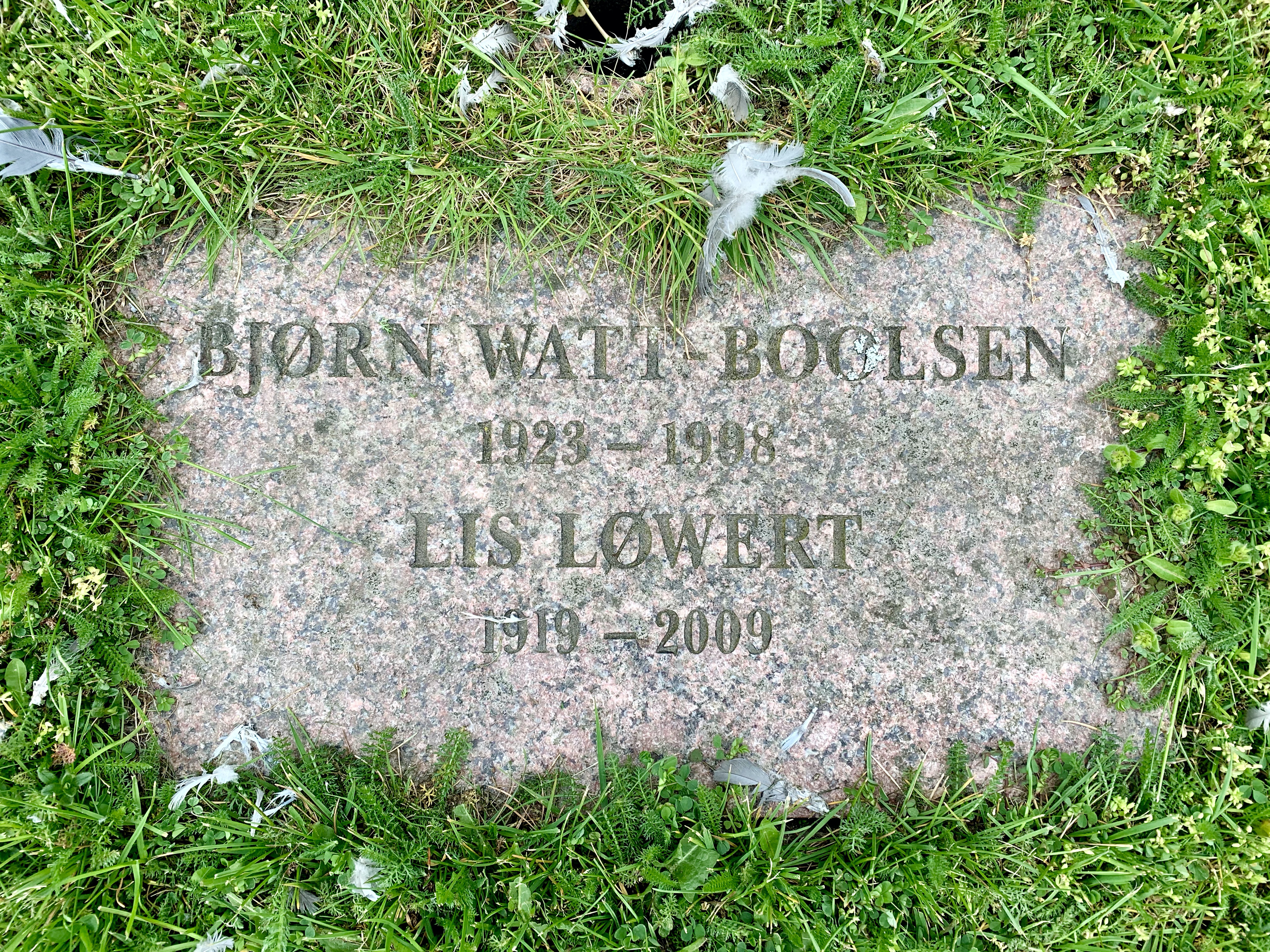 Bjørn Watt-Boolsen og Lis Løwerts gravminde